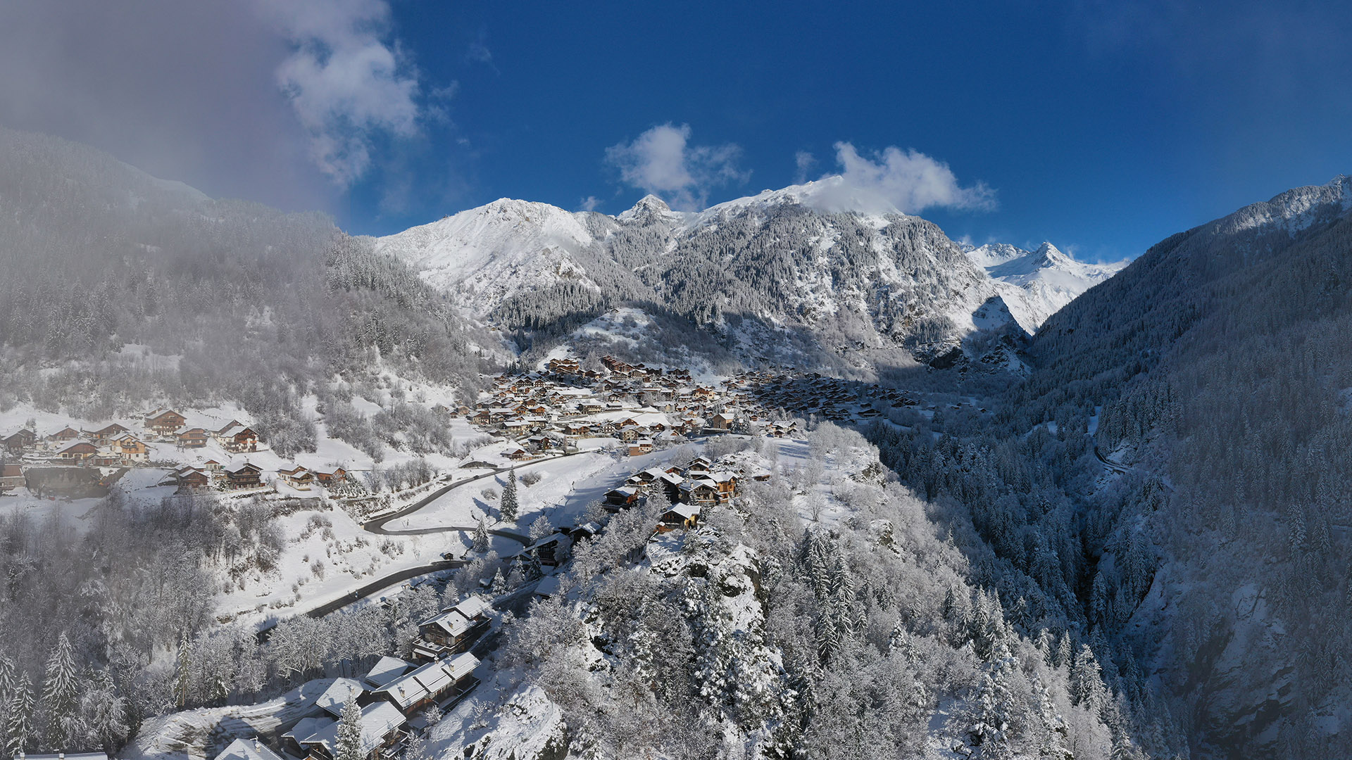 Village de La Plagne Champagny en Vanoise en hiver.